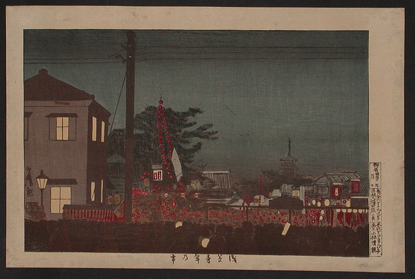 浮世絵 浅草寺年乃市